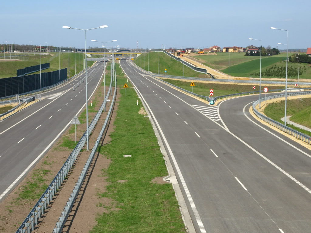 Die fertiggestellte polnische Autobahn A1 auf dem Abschnitt Rybnik-Świerklany in Richtung Gliwice im April 2011. Die Anschlussstelle Świerklany ist zu sehen.